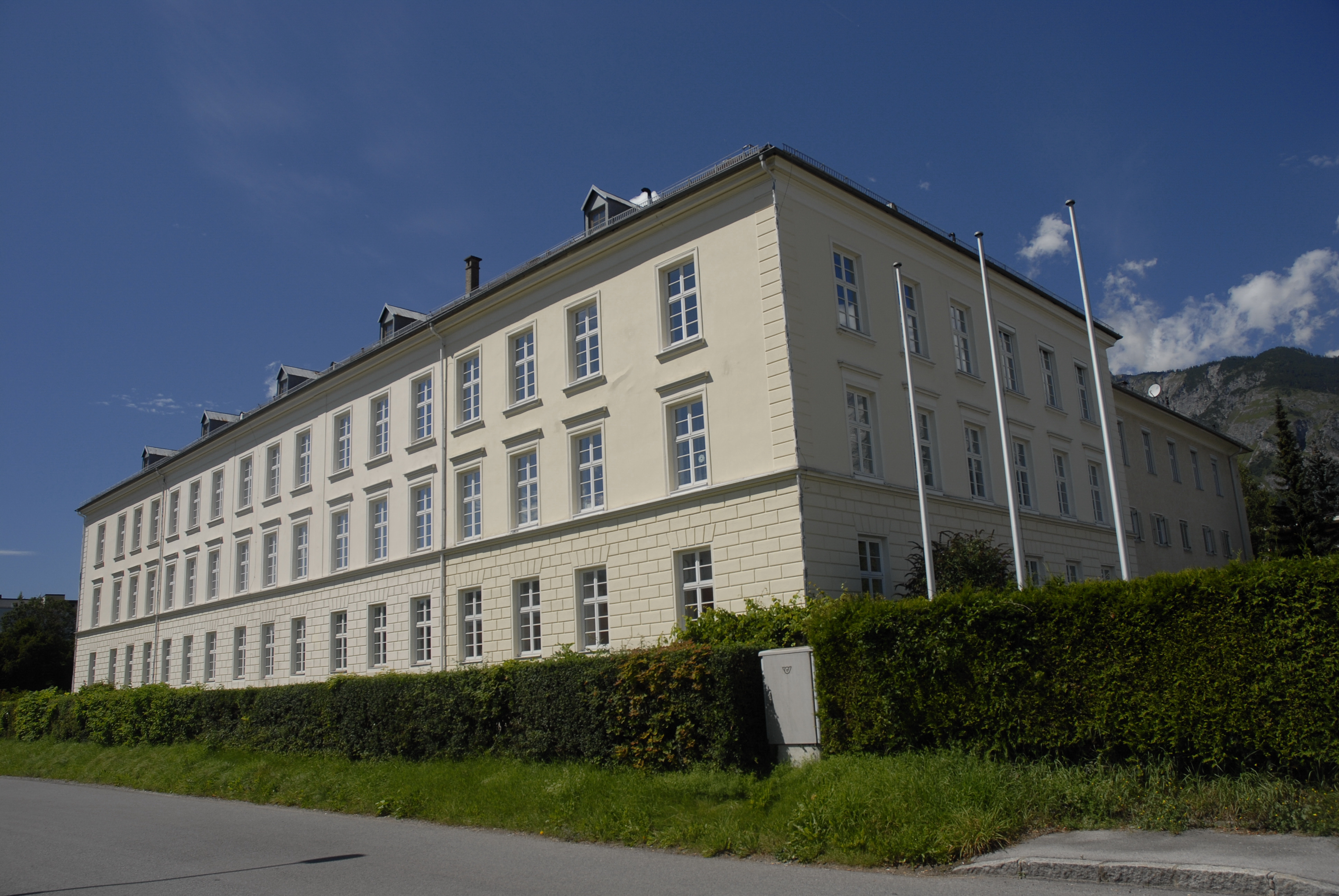 Mils, Altbau der Landes-Taubstummen-Anstalt